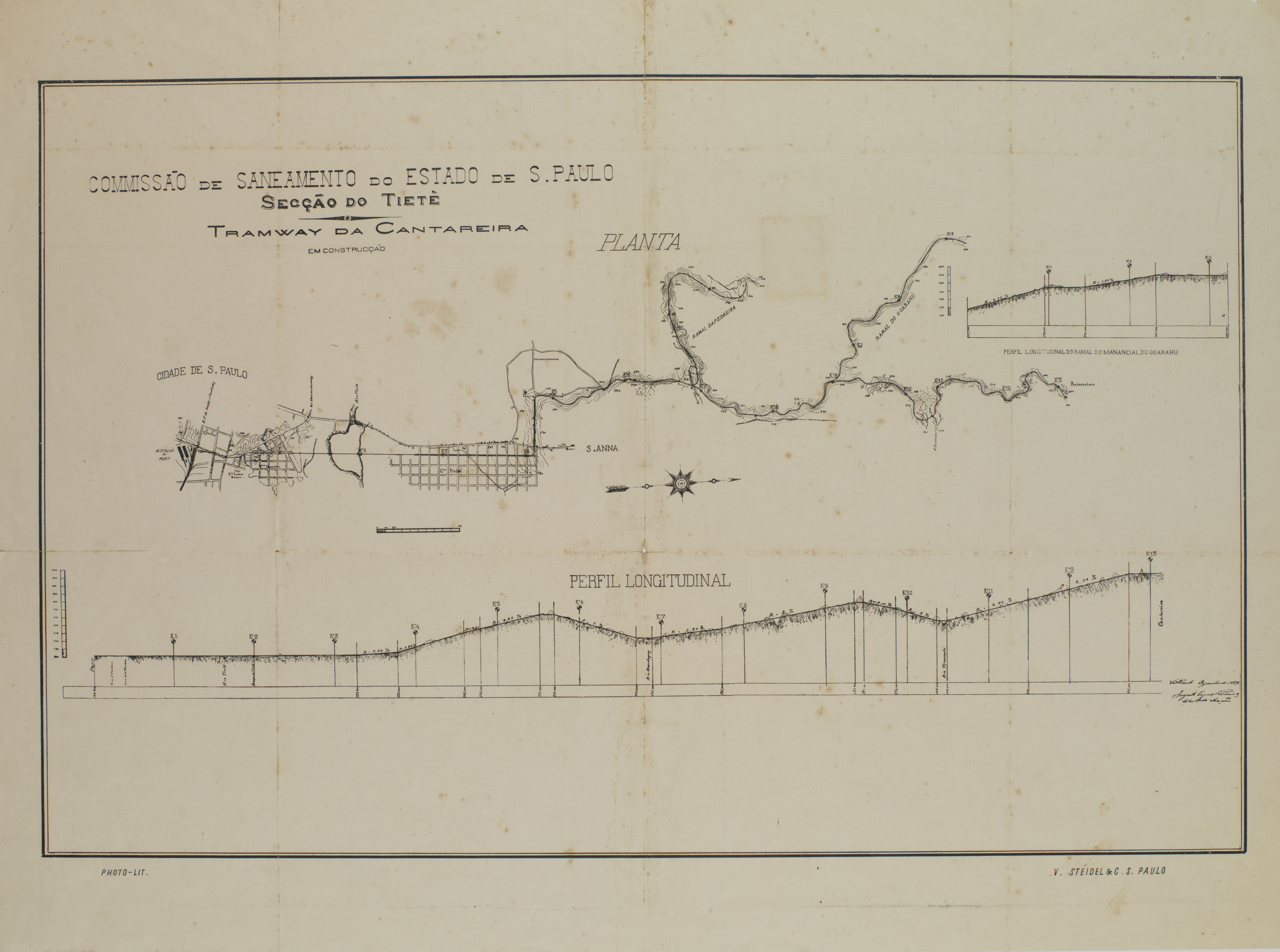 Obra que integra o acervo do Museu Paulista da USP. Coleção João Baptista de Campos Aguirra - Ref. Agente: Comissão de Saneamento do Estado de São Paulo - Estabelecimento Gráfico V. Steidel & Companhia (São Paulo)